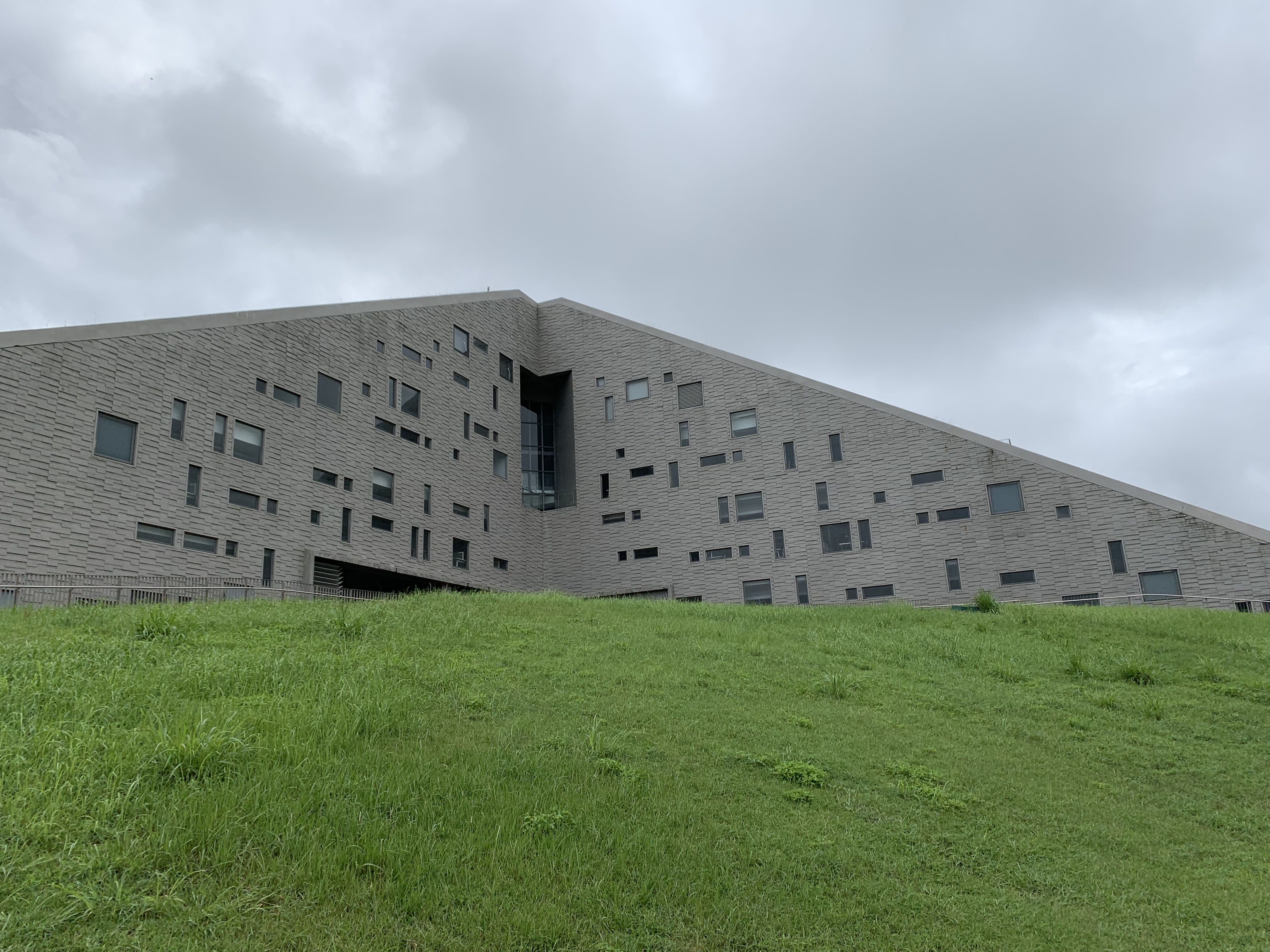 國立台東大學圖書館的正面照